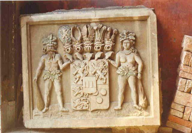 Het wapen van het geslacht Van Limburg Stirum. (ingeleverd in 1819 bij het archief van de Hoge Raad van Adel te ’s-Gravenhage) Plaats: in de paardenstal op het landgoed. Gevierendeeld: 1. in zilver een leeuw van keel, gekroond en getongd van lazuur (Limburg) 2. in keel van zilver, gekroond van goud (Bronkhorst) 3. in goud twee stappende en aanziende leeuwen, boven elkander, van keel (Wisch) 4. in goud drie koeken (of bollen) van keel (borkulo) voorts een midden- of hartschild, waarin een faas van keel beladen met drie ballen van zilver (Ghemen). Een schild gedekt met vijf helmen, voorzien van kronen, voorzien van helmtekens. Schildhouders; een wilde man en een wilde vrouw. Dekkleden van zilver en keel. Keel = rood (is de 1e der kleuren)